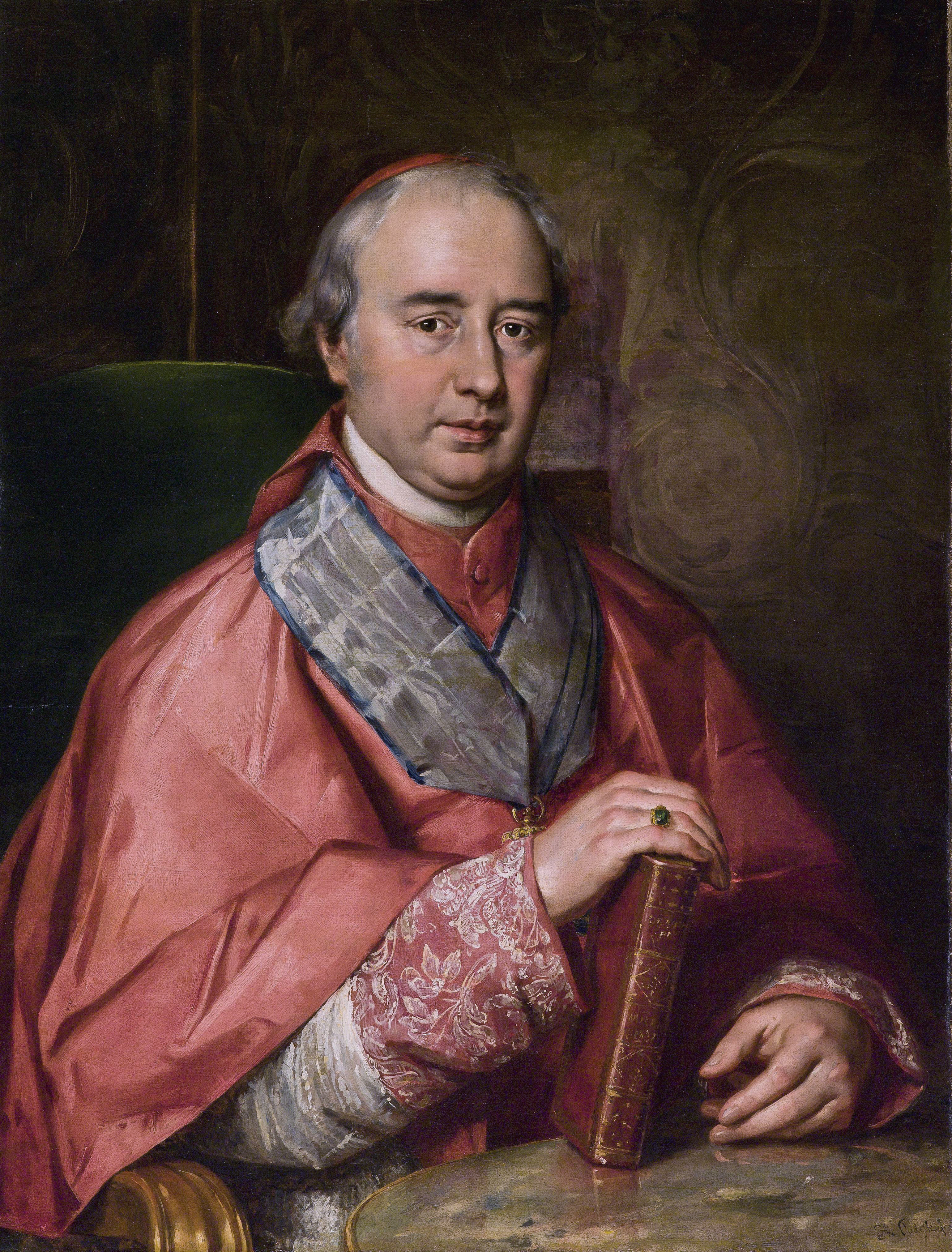 Portrait of Ludovico Gazzoli (Terni 1774 – Rome 1858), cardinal